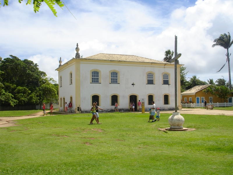 Old prison in Porto Seguro.